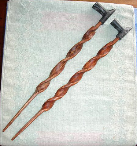 Image fournie par Ethnomusimaniac pour illustrer l'article sur le calumet. ©éréales Kille® | | ☺ | en ce 22 août 2006 à 12:02 (CEST)